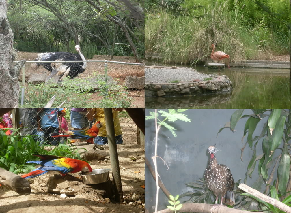 Parque Zoológico y Botánico Bararida, Barquisimeto estado Lara - Venezuela